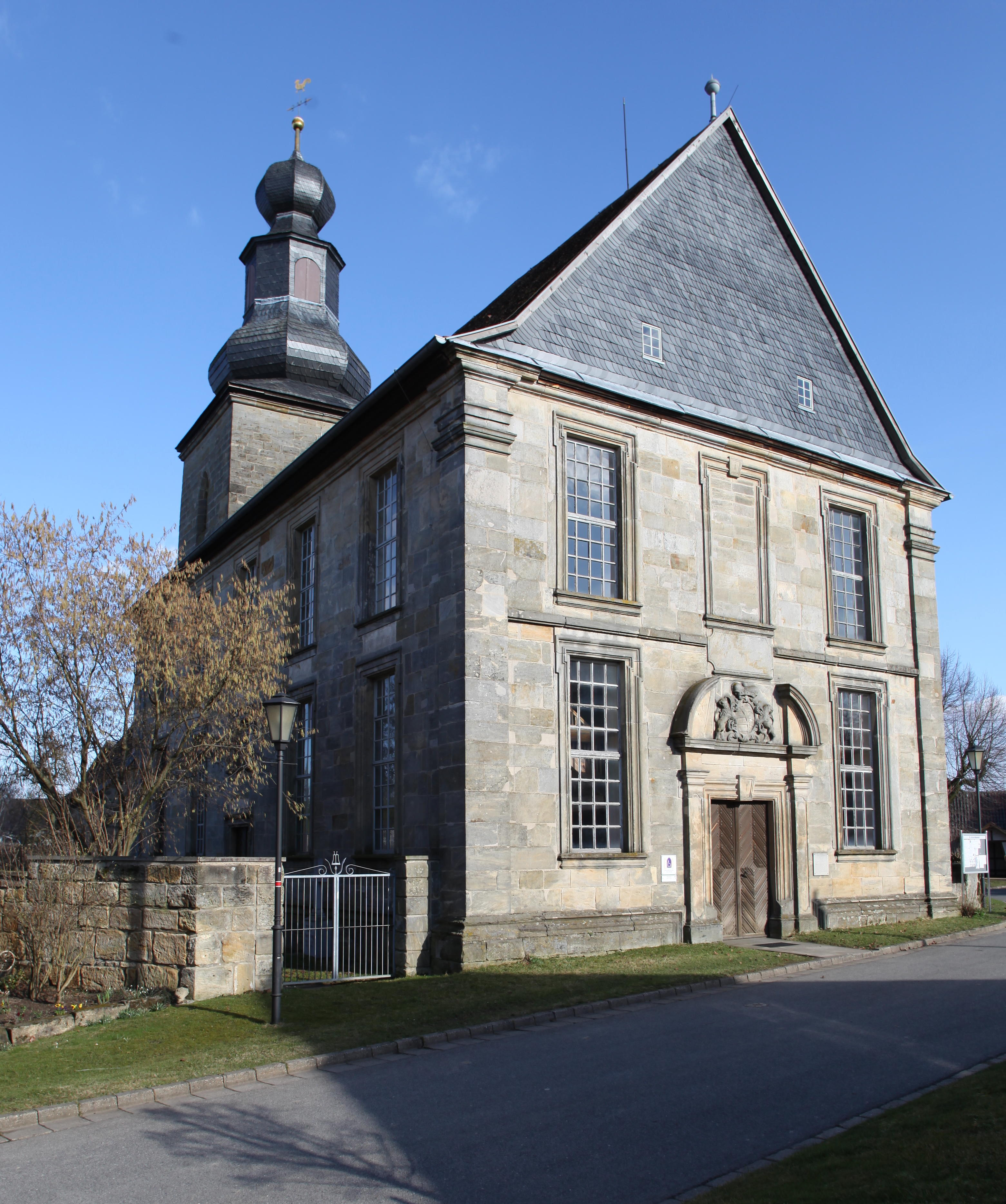 Evangelische Kirche St. Marien in Watzendorf, Landkreis Coburg